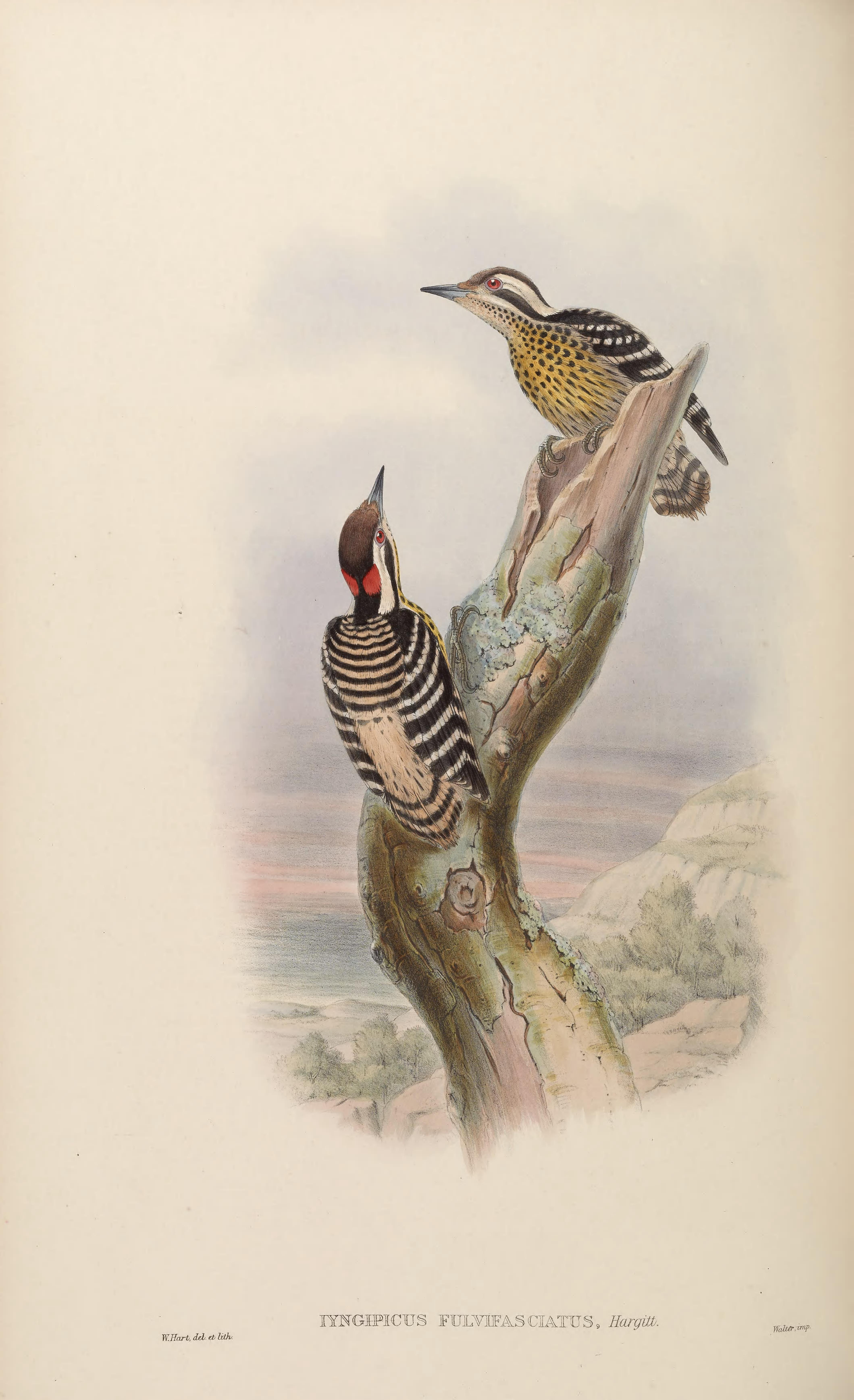 Iyngipicus fulvifasciatus = Dendrocopos maculatus fulvifasciatus[1]